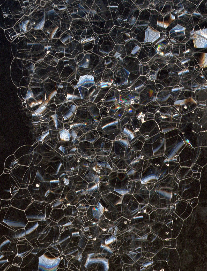 Ziepju putu burbuļi